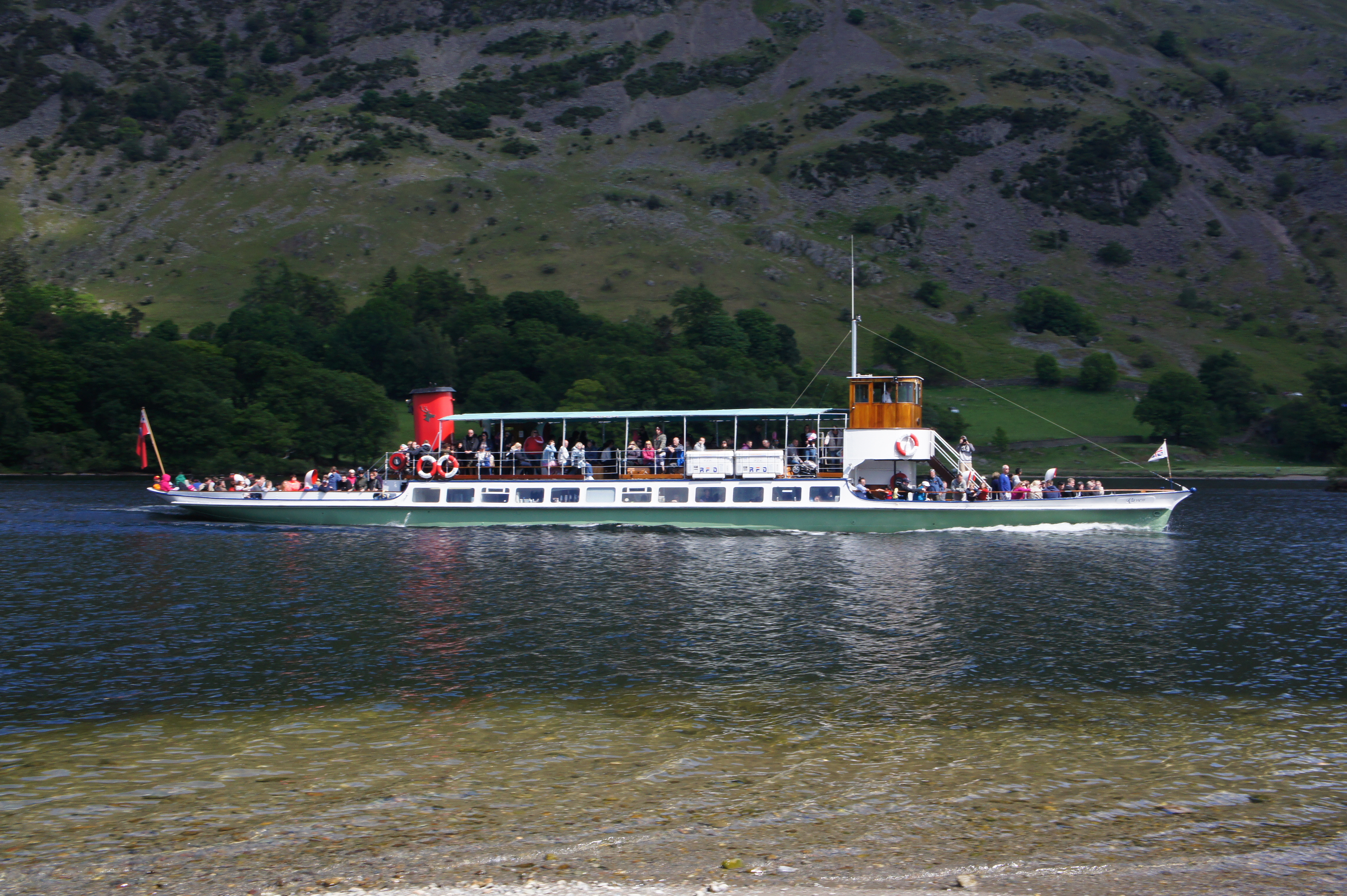 MV Raven at Glenridding on Ullswater